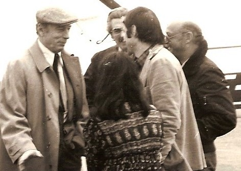 Arrivée à Bourges d'Yves Montand avant le récital qu'il donnera au Printemps de Bourges (avril 1982) de gauche à droite Yves Montand - Charley Marouani (impressario) Alain Meilland (directeur du Centre régional de la chanson de Bourges) Jean-Michel Boris (directeur de l'Olympia de Paris)- De dos Aline Chertier (décoratrice).